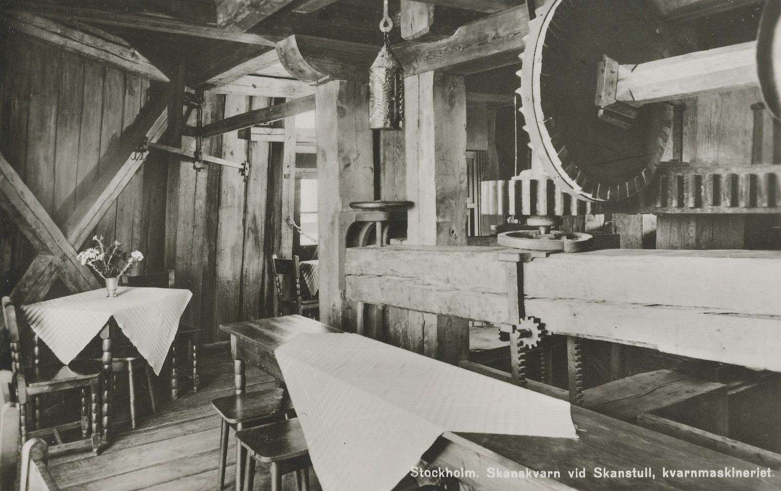 Skanskvarn, restauranginteriör